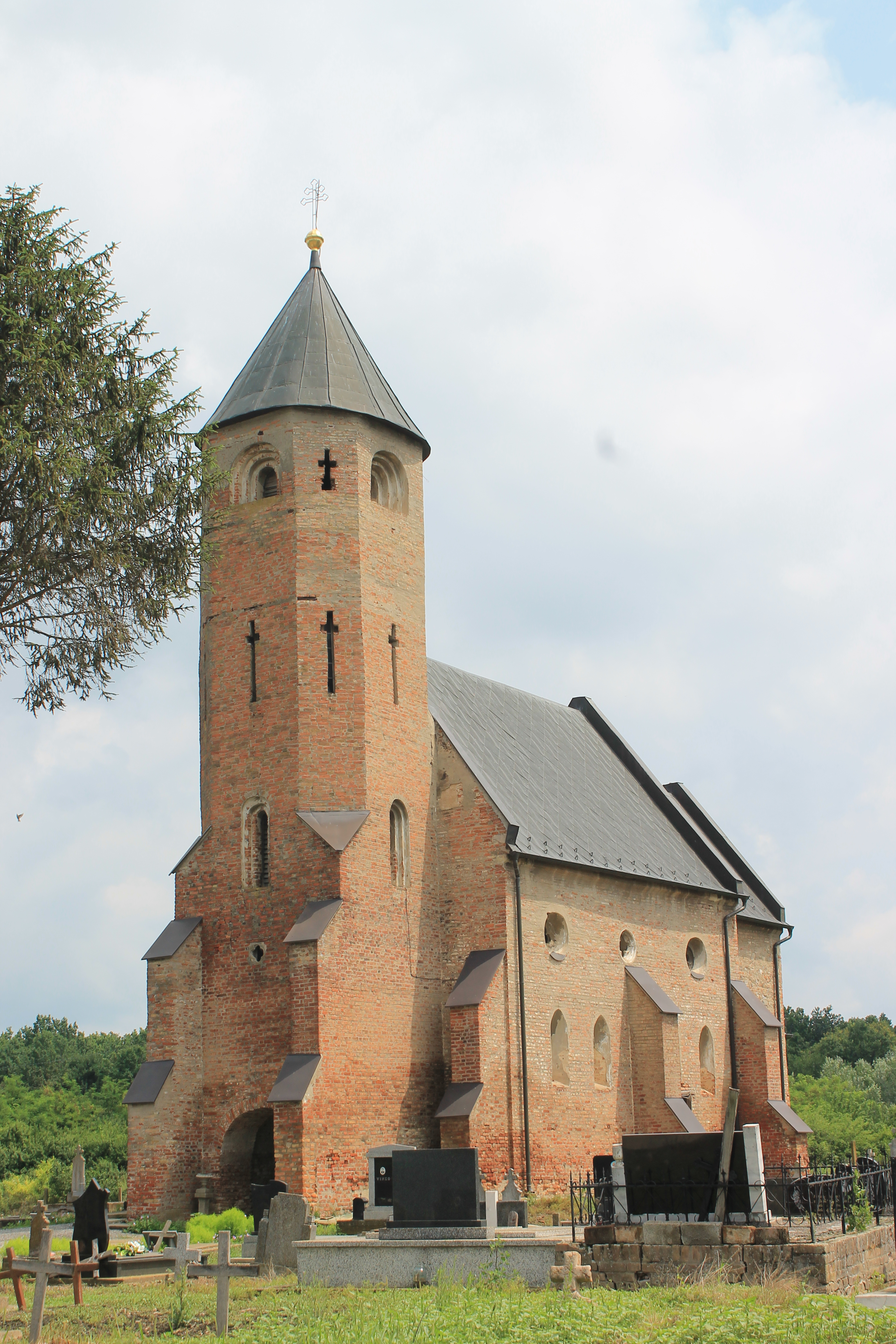 Rimokatolička crkva Sv. Marije u Moroviću